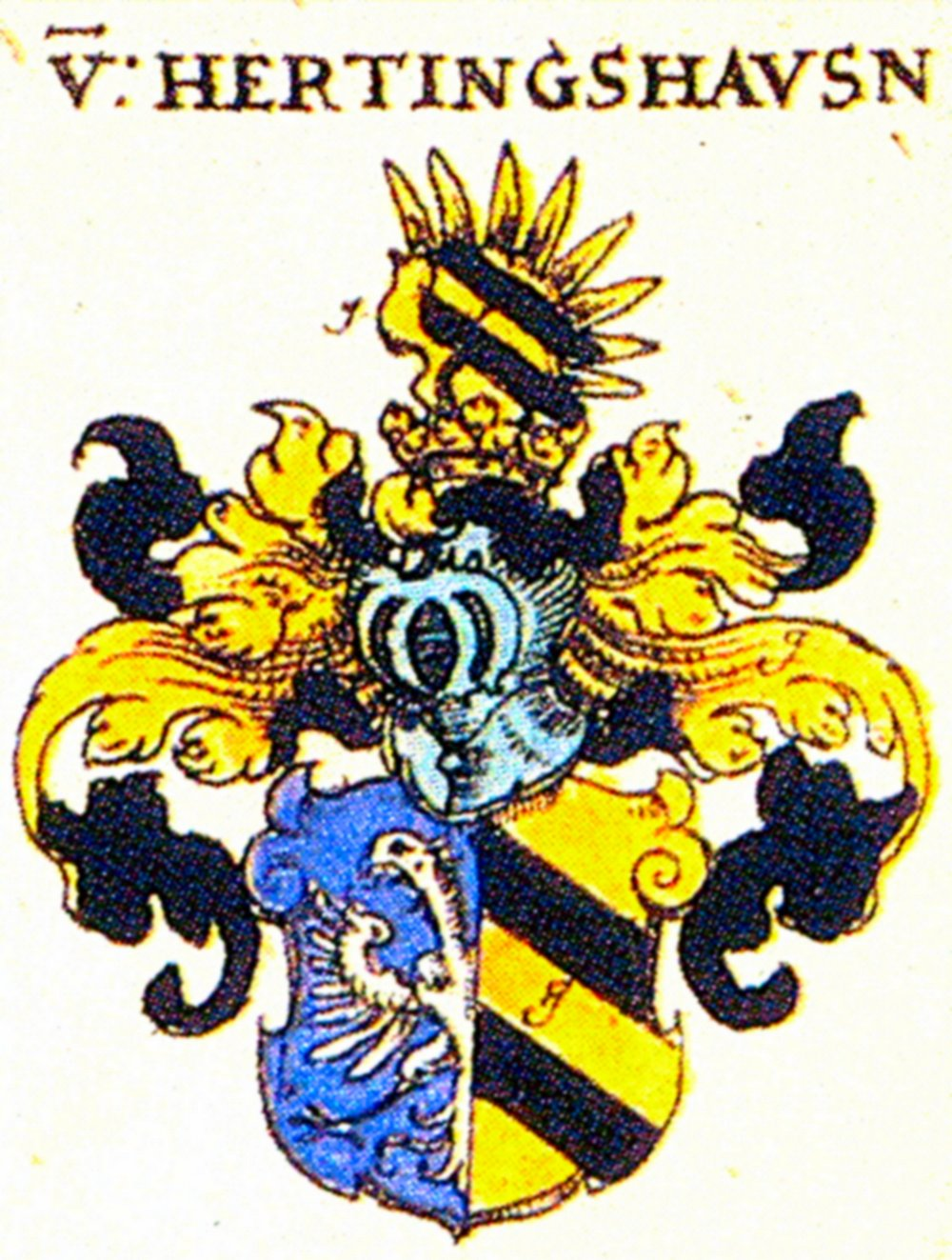 Wappen der Familie von Hertinghausen nach Siebmachers Wappenbuch